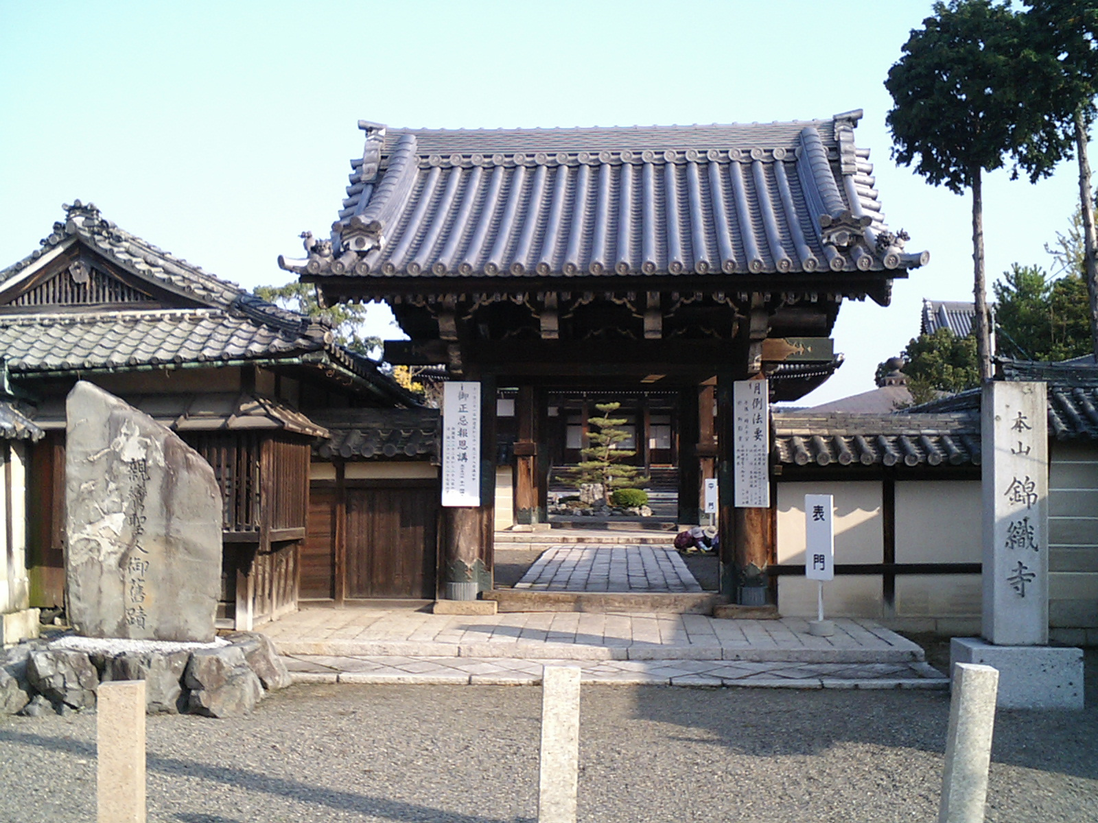 Kinshokuji temple, in Kibe, Yasu, Shiga, Japan.